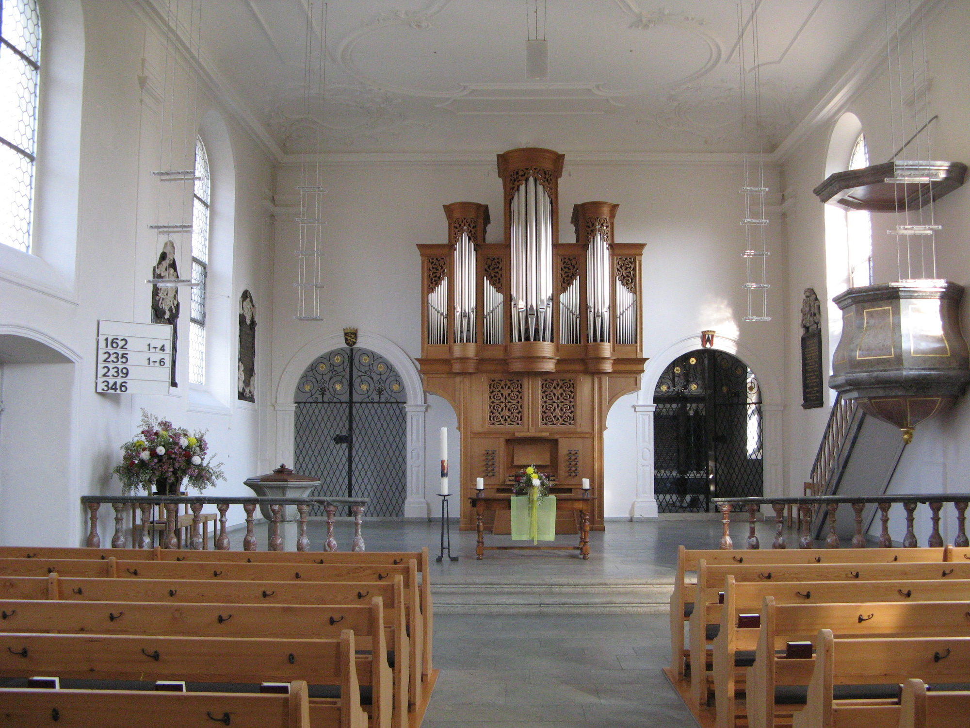 Innenraum der Reformierten Kirche Schinznach-Dorf mit Orgel